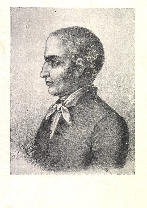 Kőrösi Csoma Sándor, sz. Csoma Sándor (Csomakőrös, 1784. március 27. – Dardzsiling, 1842. április 11.), saját szavaival: székely-magyar Erdélyből ("Siculo-Hungarian of Transylvania"), nyelvtudós, könyvtáros, a tibetológia megalapítója, a Tibeti-Angol szótár megalkotója. Kőrösi Csoma Sándor egyetlen hiteles portréjának története, terebess.hu